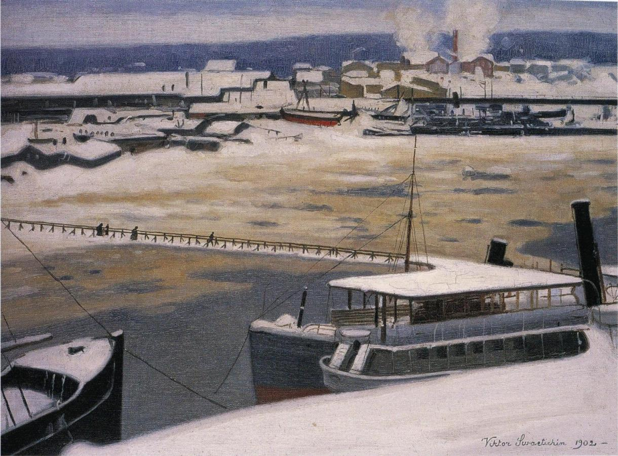 Viktor Svaetichinin maalaus Viipurin (?) satamasta. Maalauksen omisti aikoinaan Viipurin historiallinen museo, nykyään Lahden historiallinen museo.